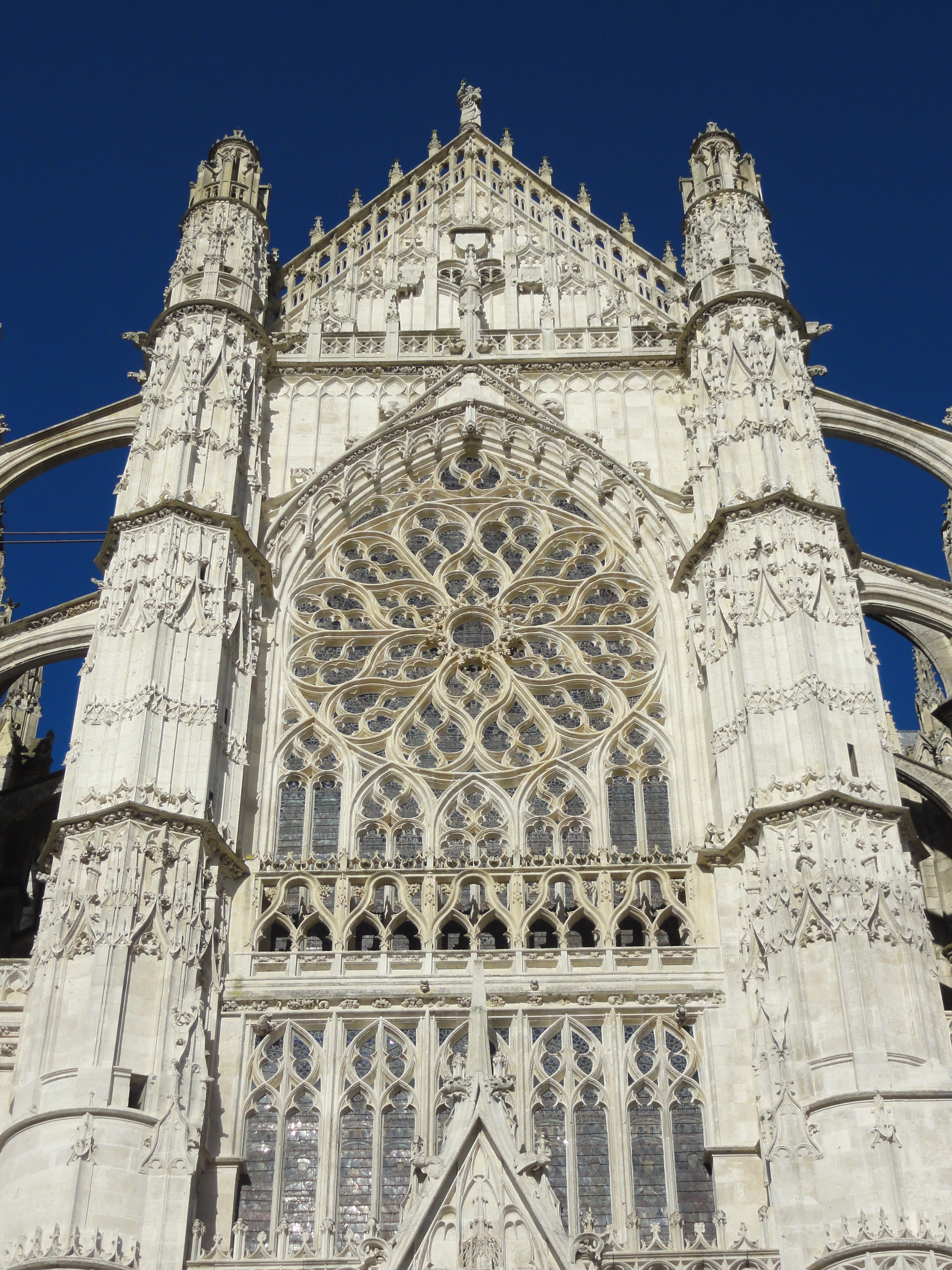 Croisillon sud, parties hautes.